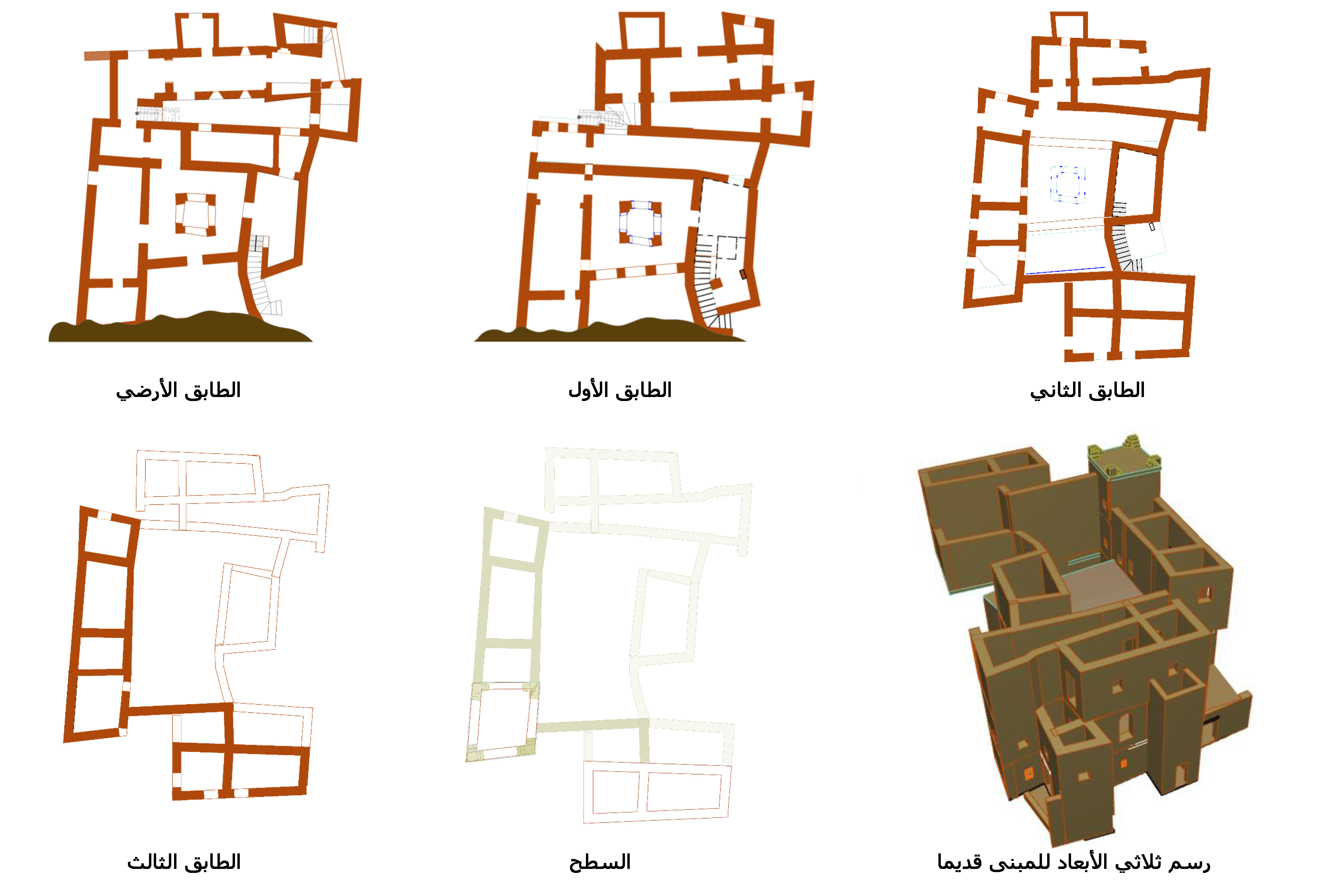 مخططات هندسية و رسم ثلاثي الأبعاد لدار "أمغار"، منزل أكبر أسرة في قصر آيت بن حدو. يتكون المنزل من عدة طوابق، و يتميز بتوفره على فناء داخلي، تتوزع حوله الغرف على شكل مجموعات غرف متصلة ببعضها البعض.